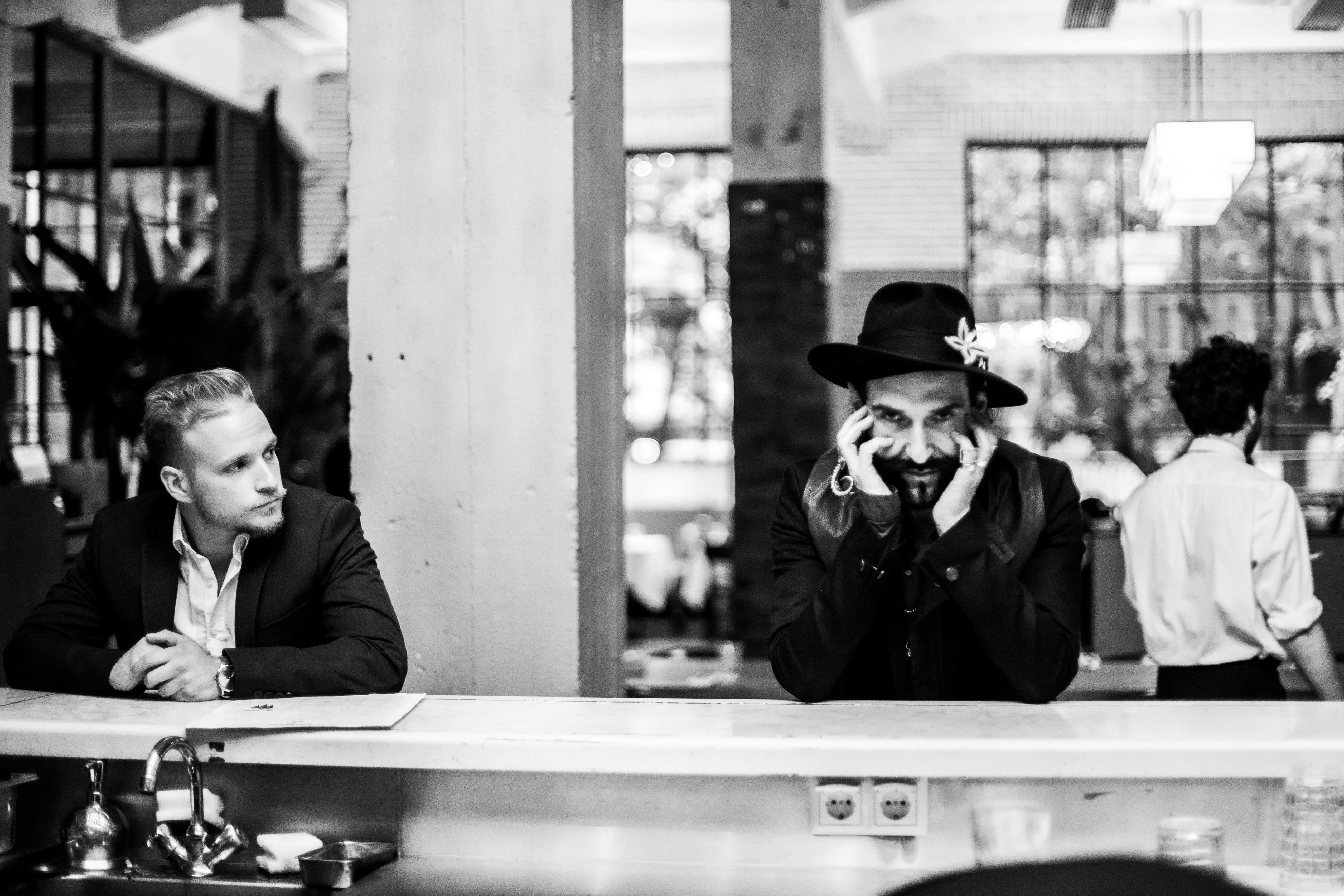 این عکس ها توسط پوریا افخمی در هتل استامبا واقع در شهر تفلیس کشور گرجستان ثبت شده است